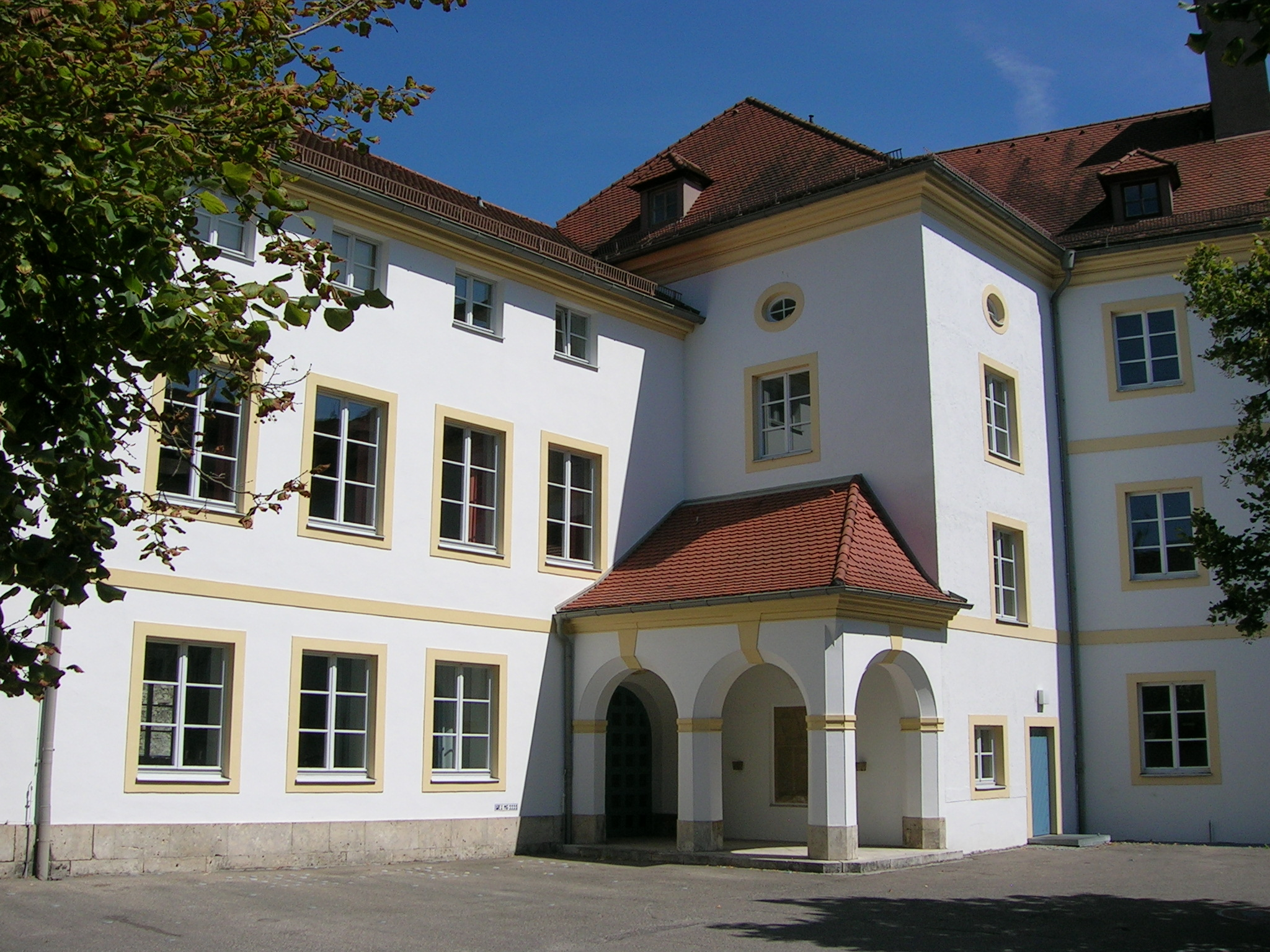 Nordostecke im Innenhof der Luitpoldstraße 40 in Eichstätt